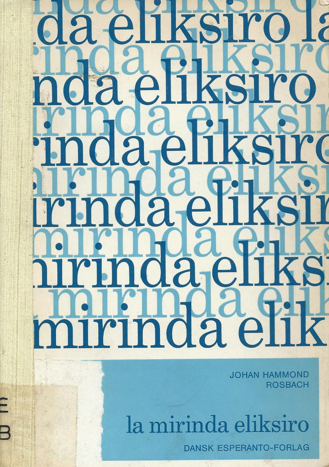 librokovrilo de "La Mirinda Eleksiro", 1968